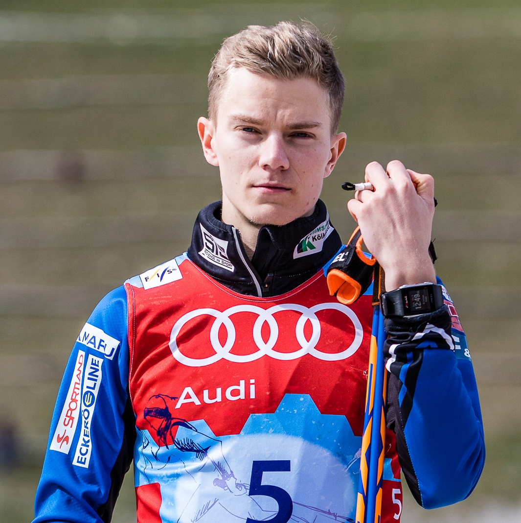 Kristjan Ilves, Planica, 2017